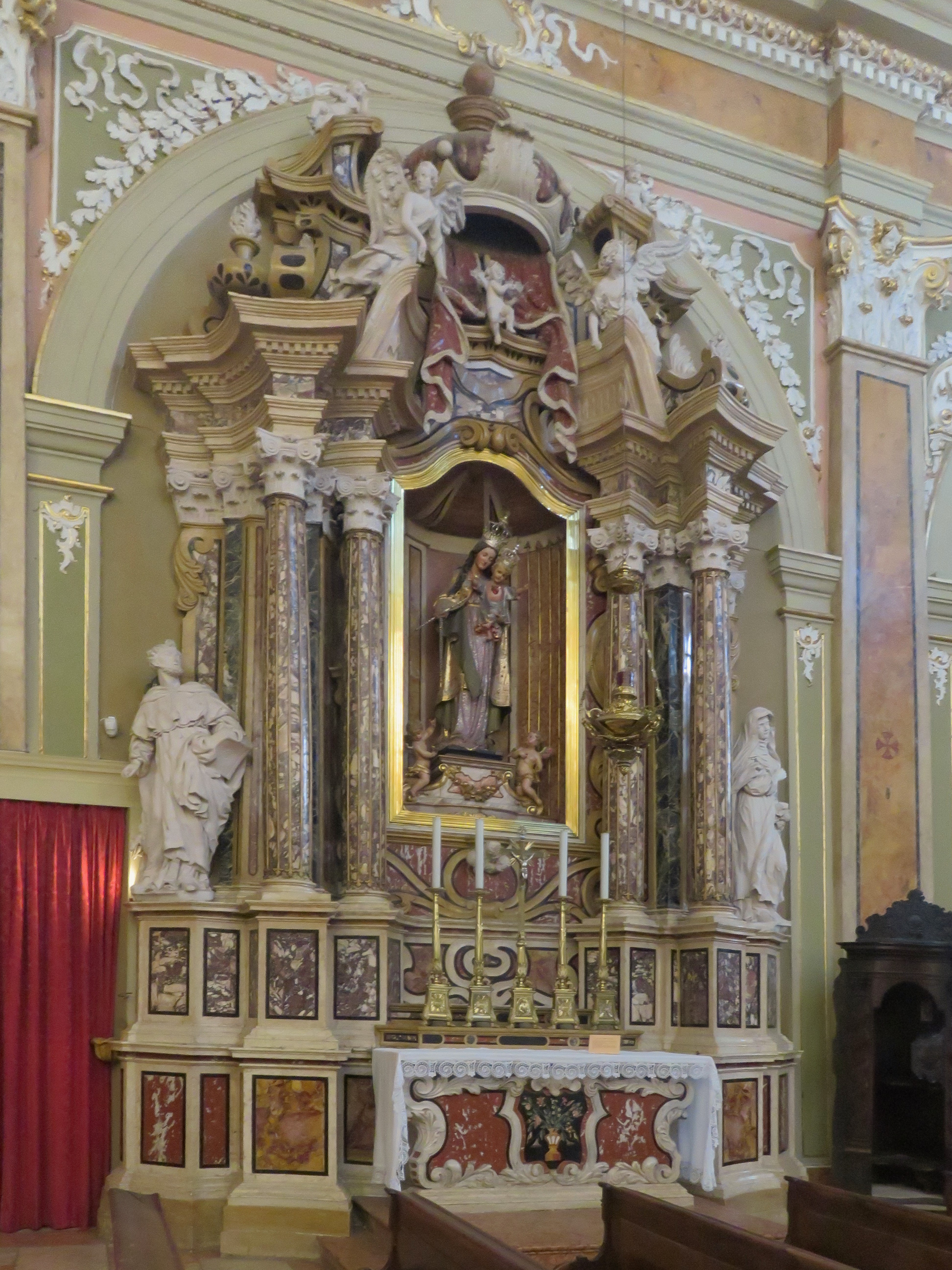 altare nella chiesa di San Marco